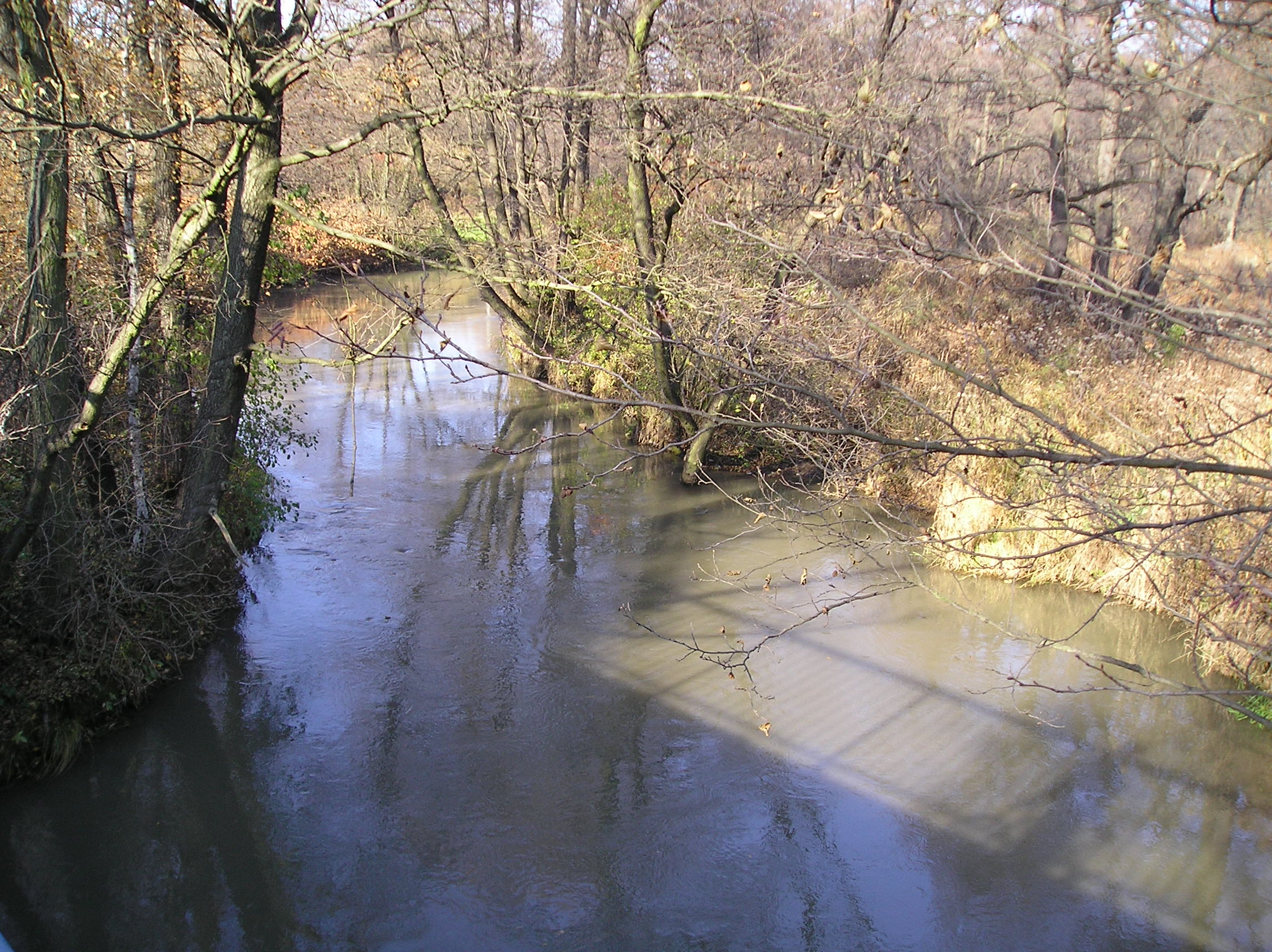 Biała Przemsza w Sławkowie (woj. śląskie)